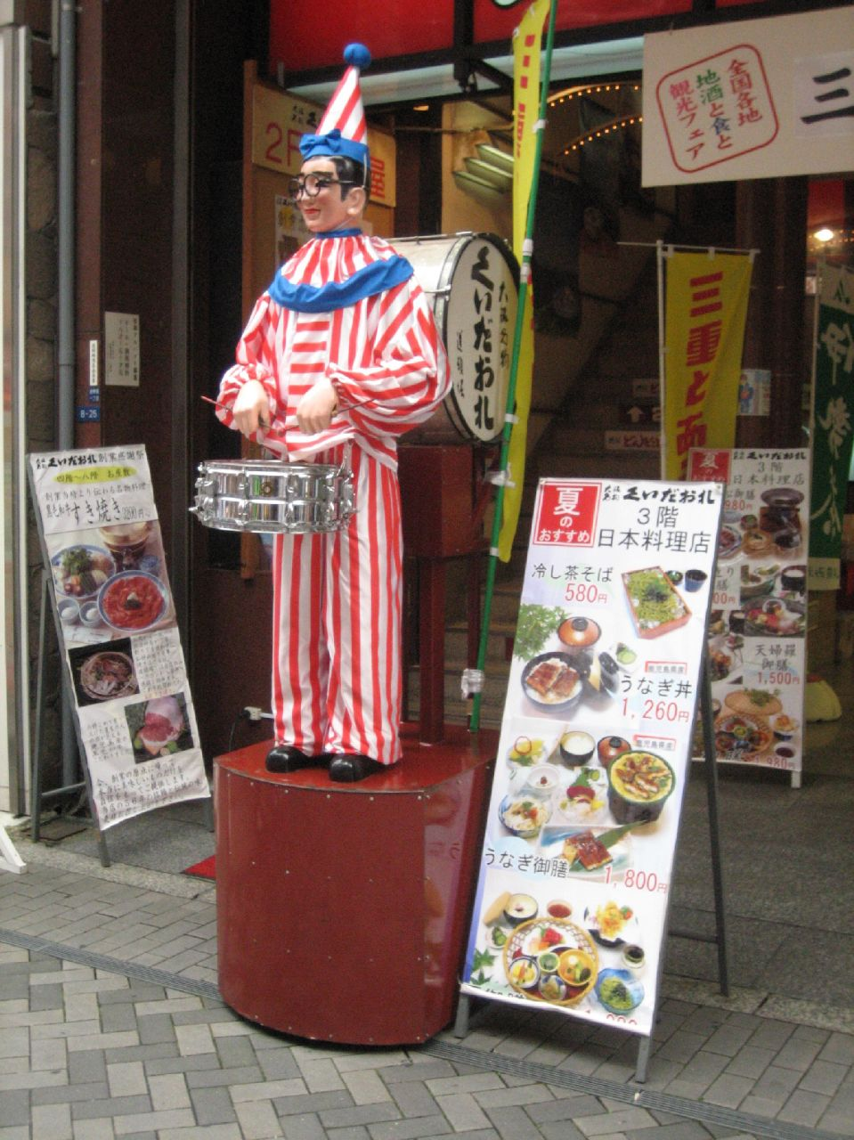 道頓堀